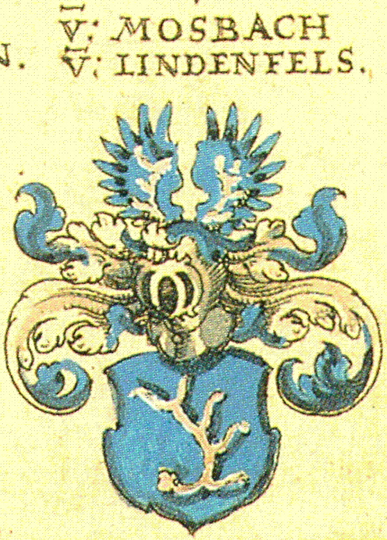 Familienwappen der Mosbach von Lindenfels unter hessischem Adel